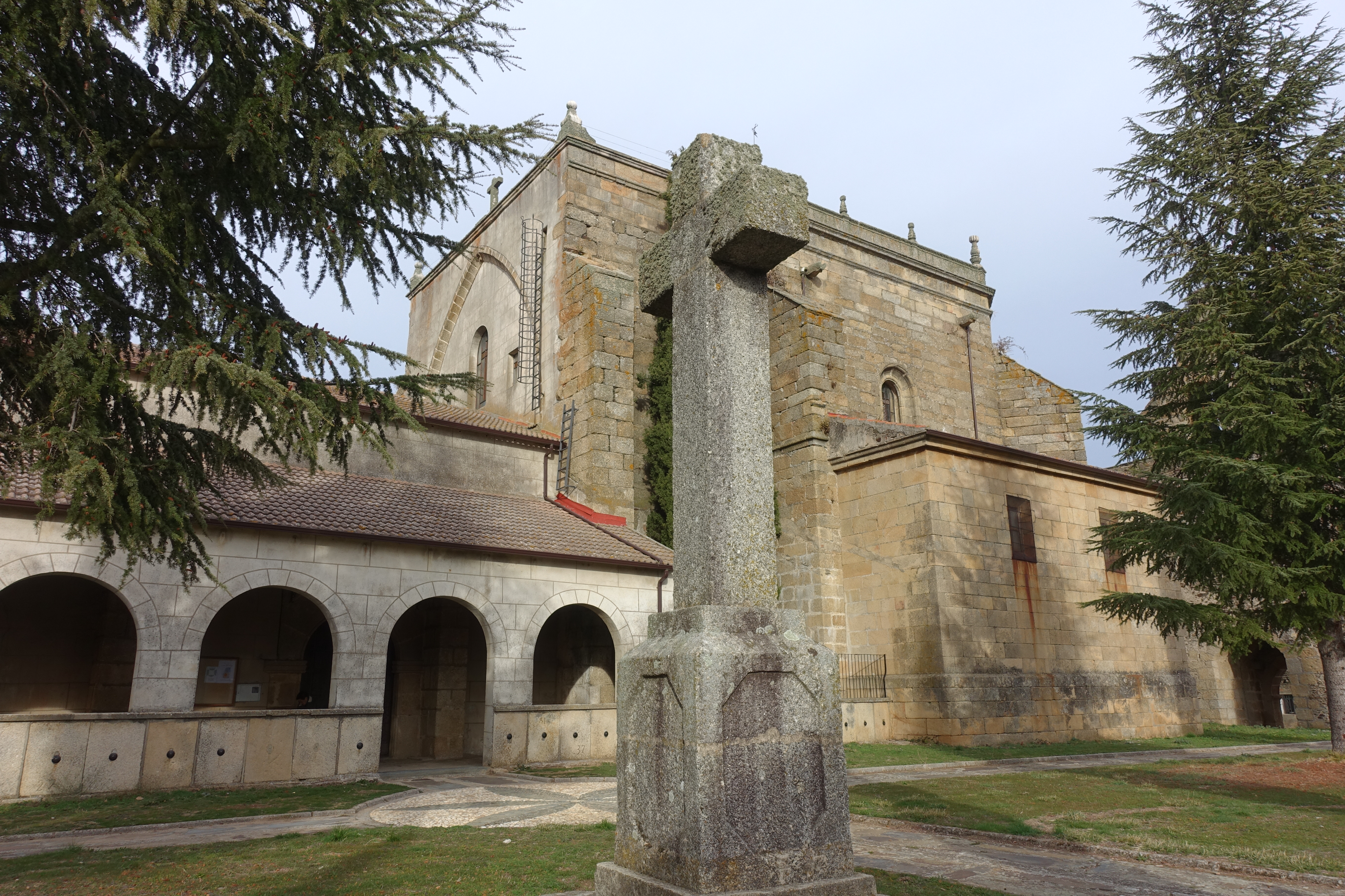 Iglesia de la Asunción, Robleda (Salamanca, España).